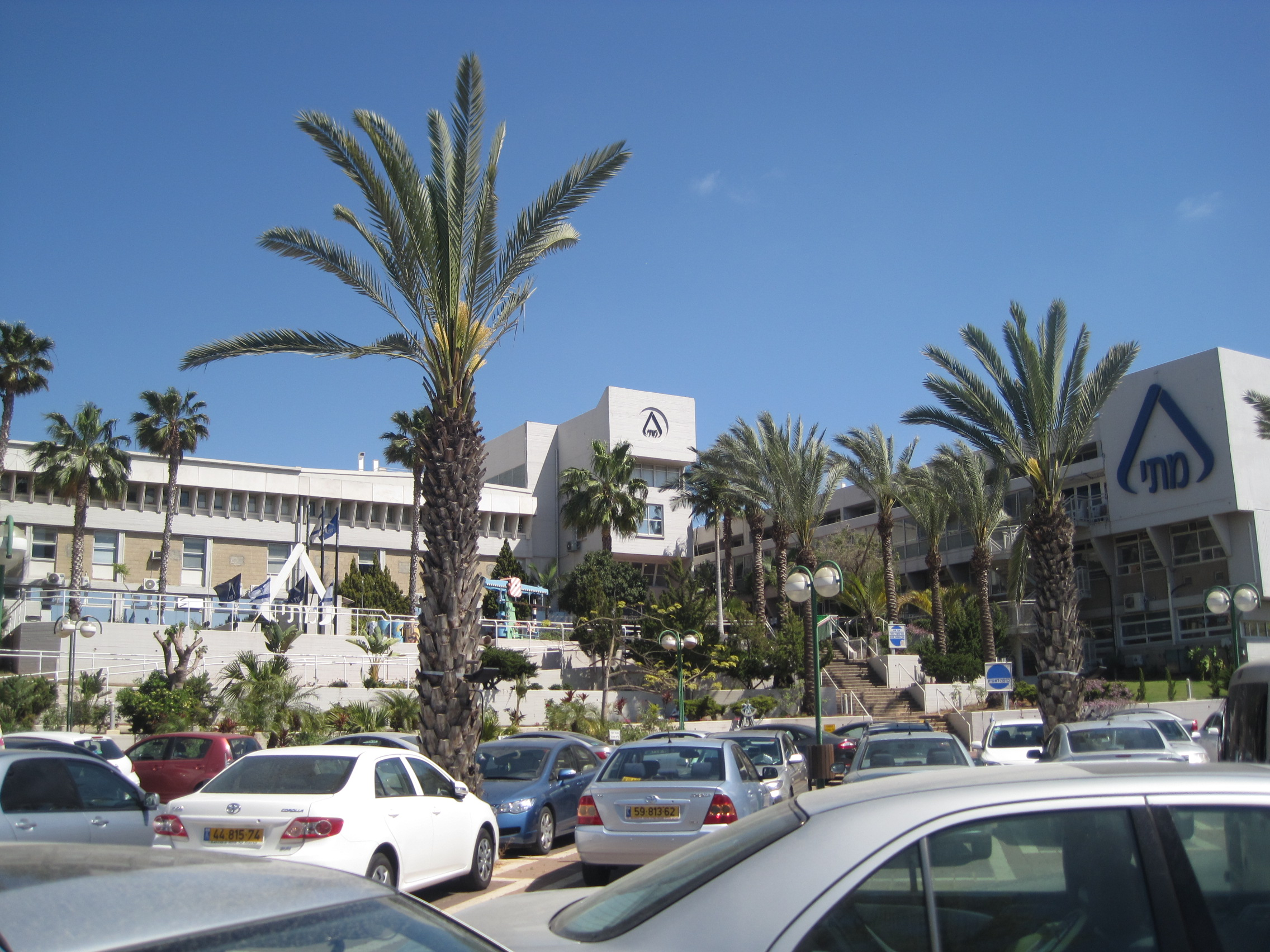 מכון התקנים הישראלי